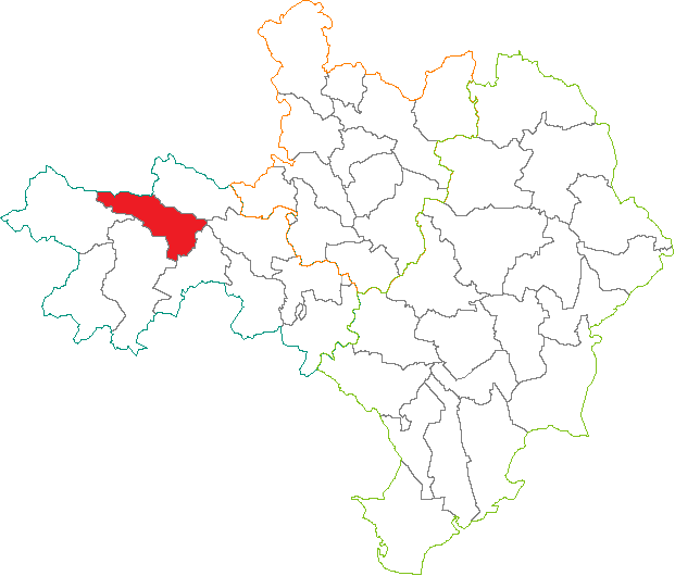 Situation du canton dans le département du Gard (France)